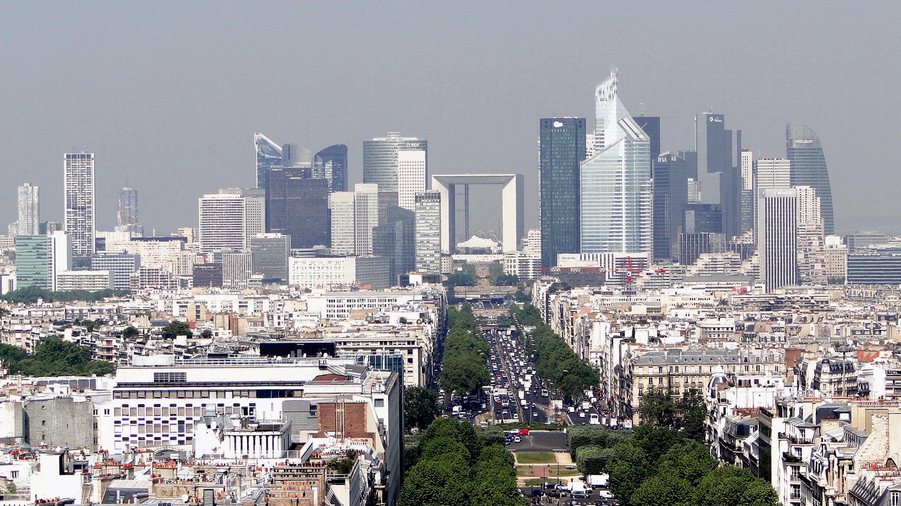 Grande Arche, Nanterre Hauts de Seine 81